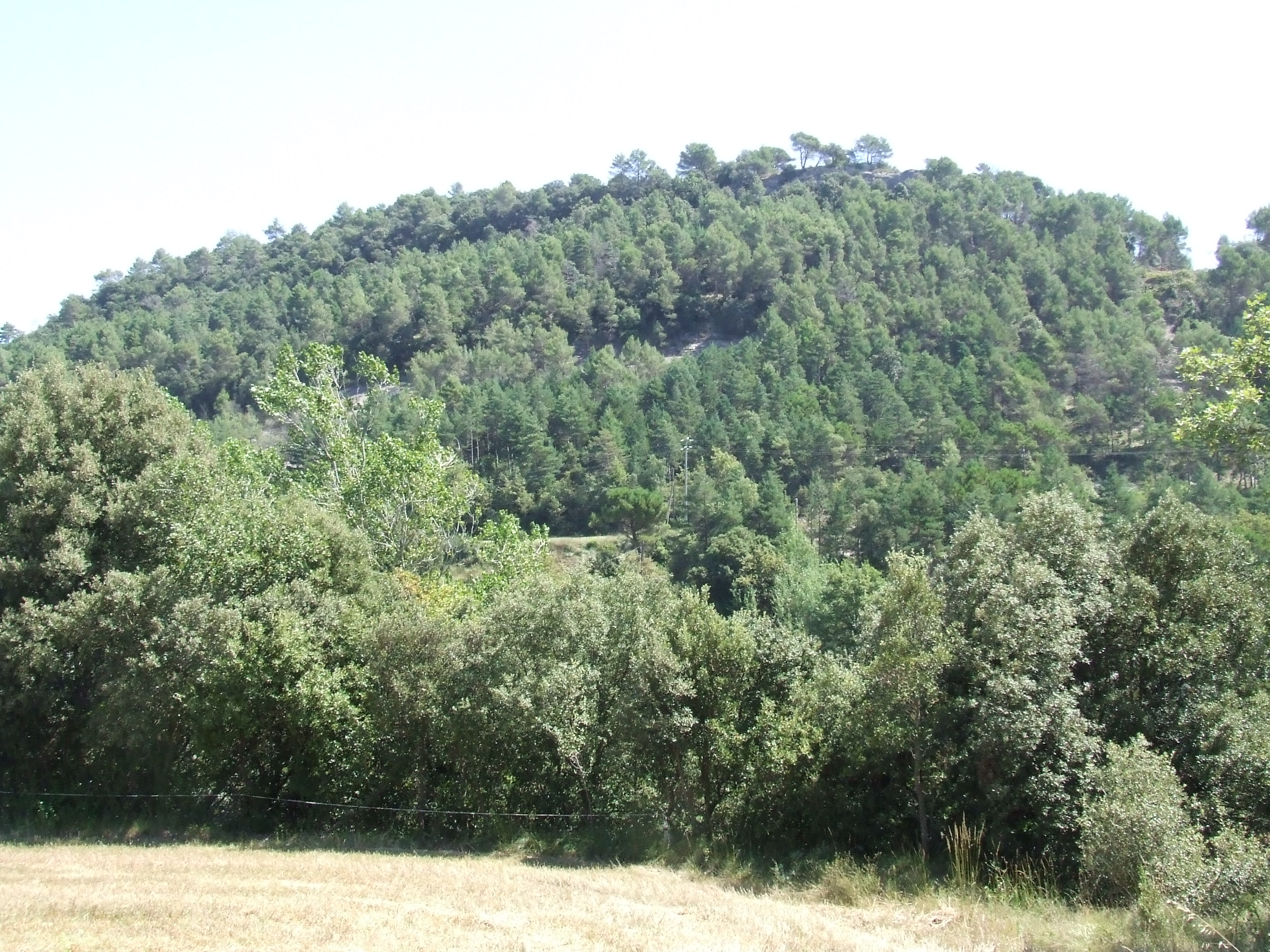 El Gurugú (Castellcir, Moianès)